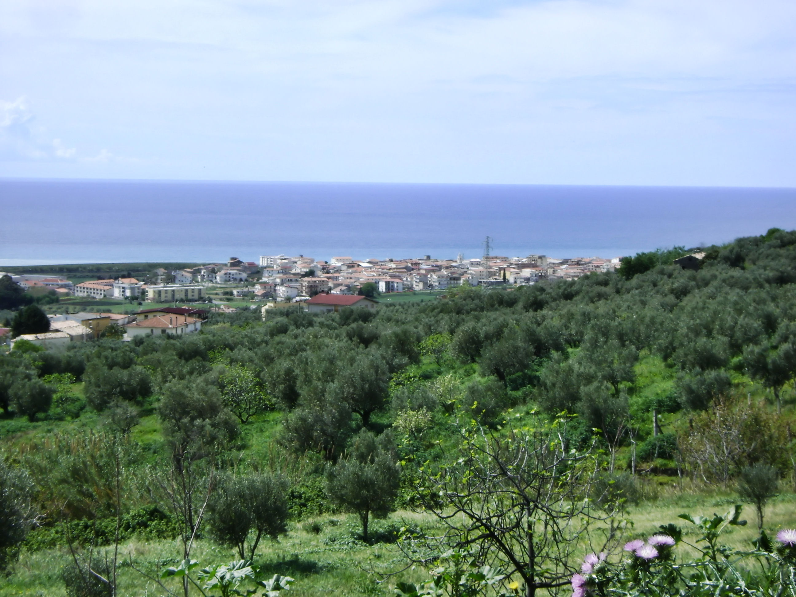 Io Lodewijk Vadacchino, cedo a Wikimedia Italia la foto ritraente il Panorama del Mio Paese Natio, ho inviato prestamente qulache minuto fa una mail di conferma per la mia avvenuta procedura con la cortese vi prego di inviarmi al più lestamente possibile il ORTS di Conferma affinché possa essere caricato su commons e Campora San Giovanni avere gli aggiornamenti. Grazie22:57, 16 apr 2009 (CEST)